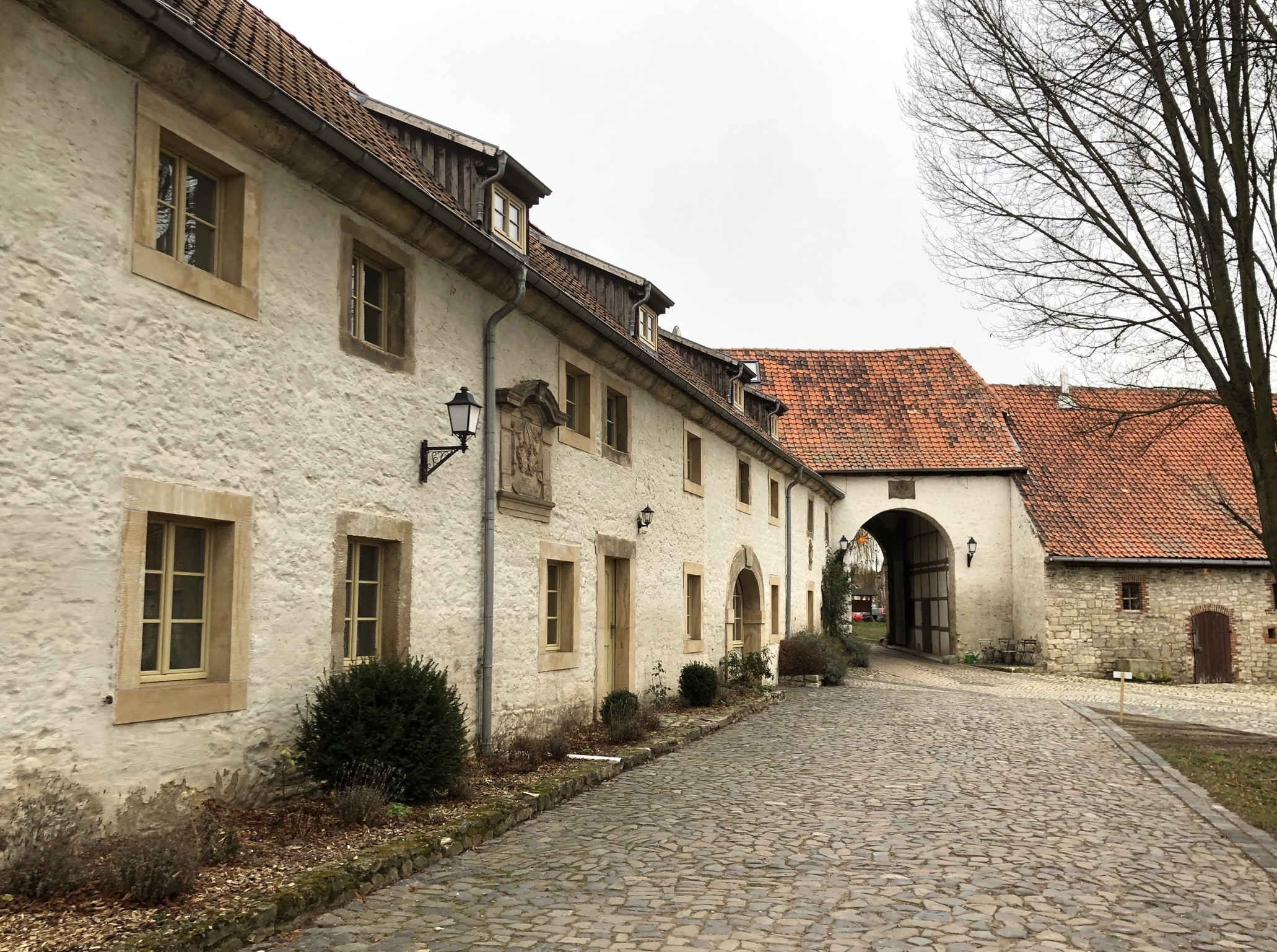 Kloster Hedersleben